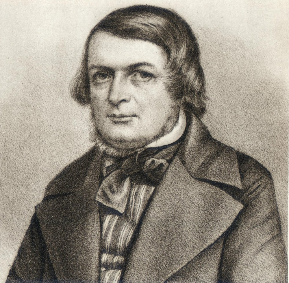 Henrik Bernhard Palmær (1801-1854), journalist. Litografi i "Nordstjernan" 1848.